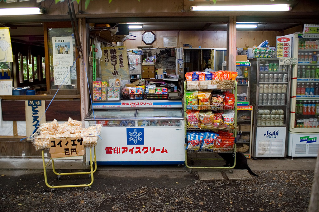 @井の頭公園